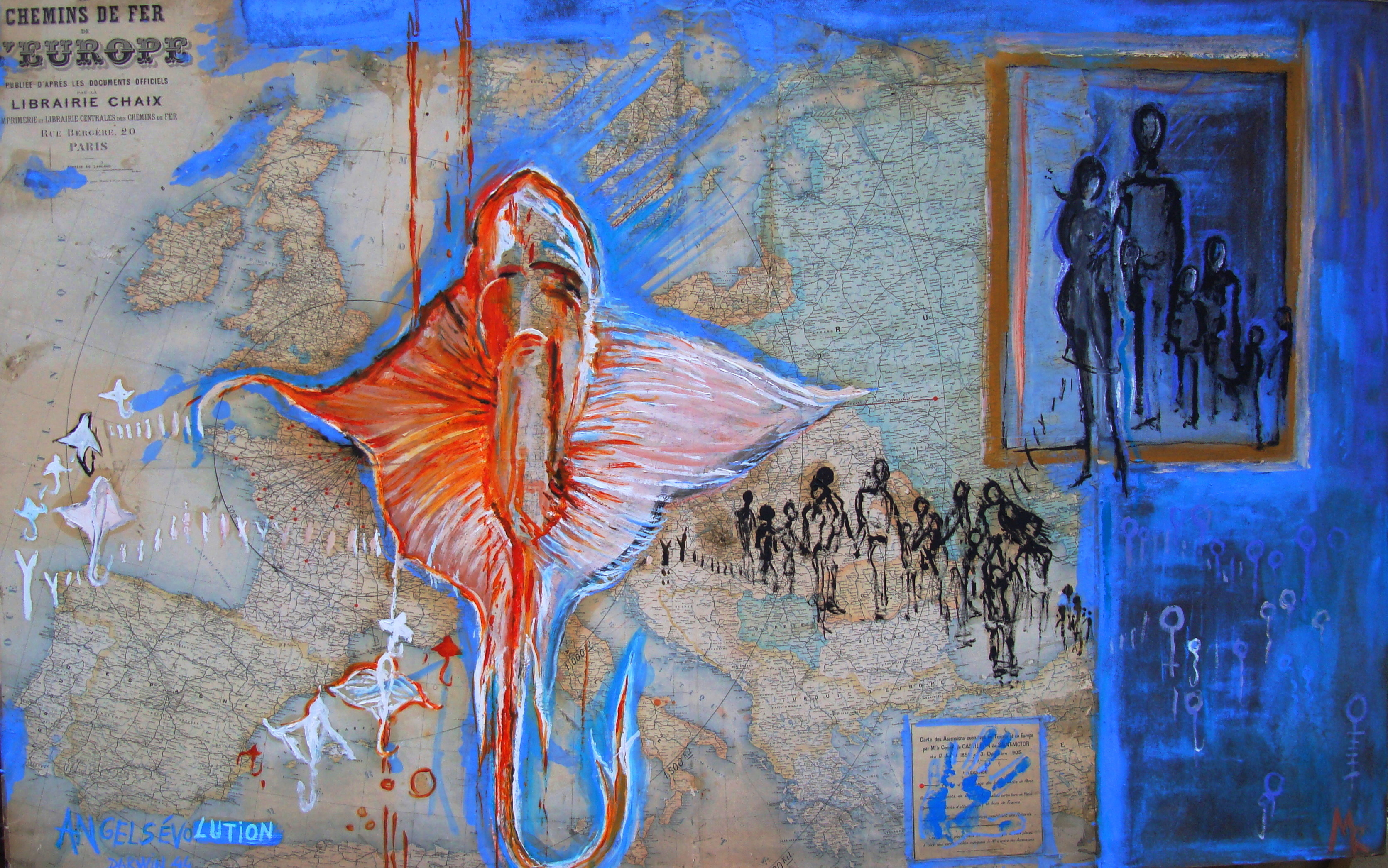 Angel's Evolution / Huile sur panneau /300 X 210 CM Collection privée PARIS